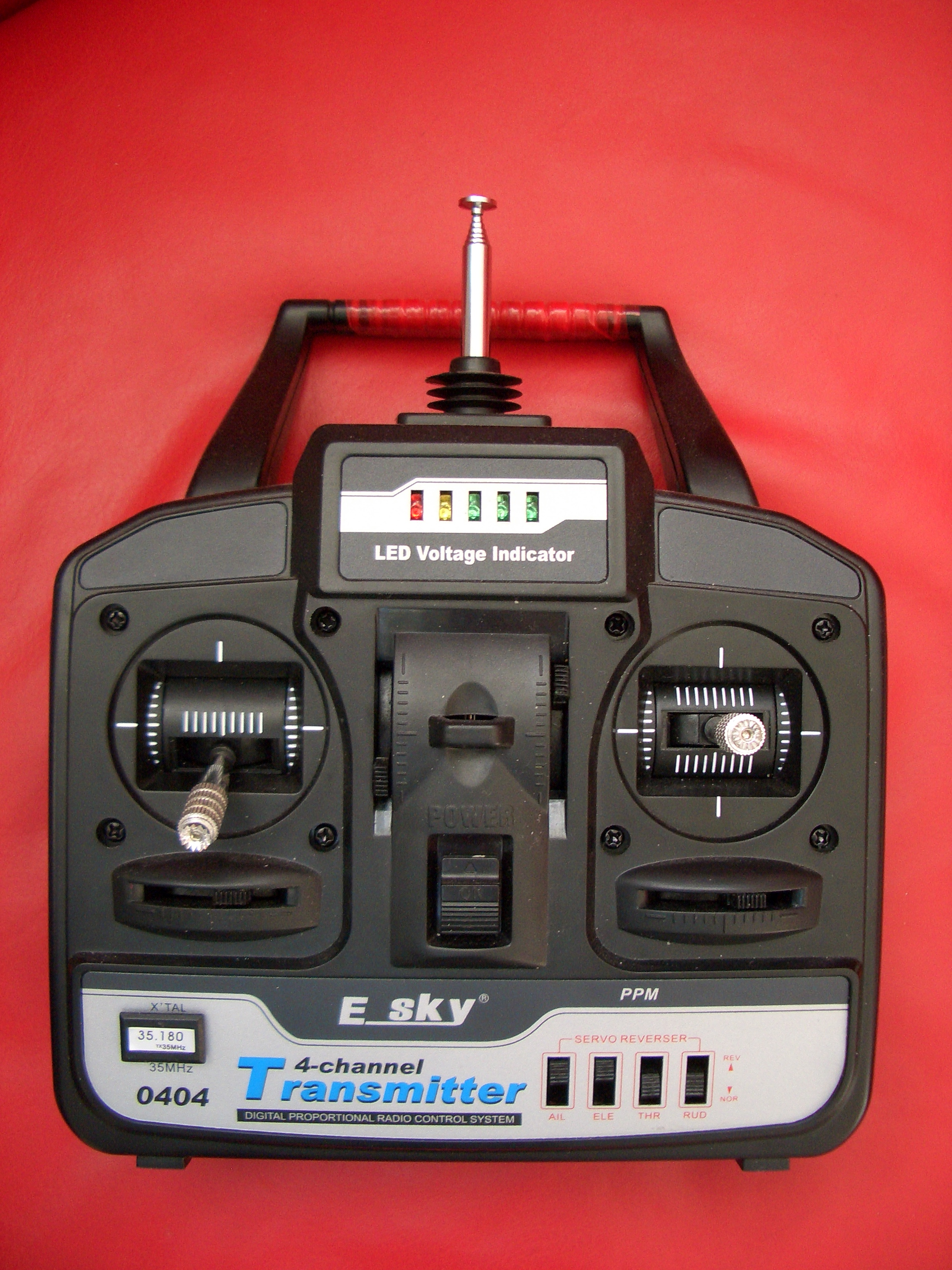 Передатчик рычажкового типа. Четырёхканальный пульт управления.